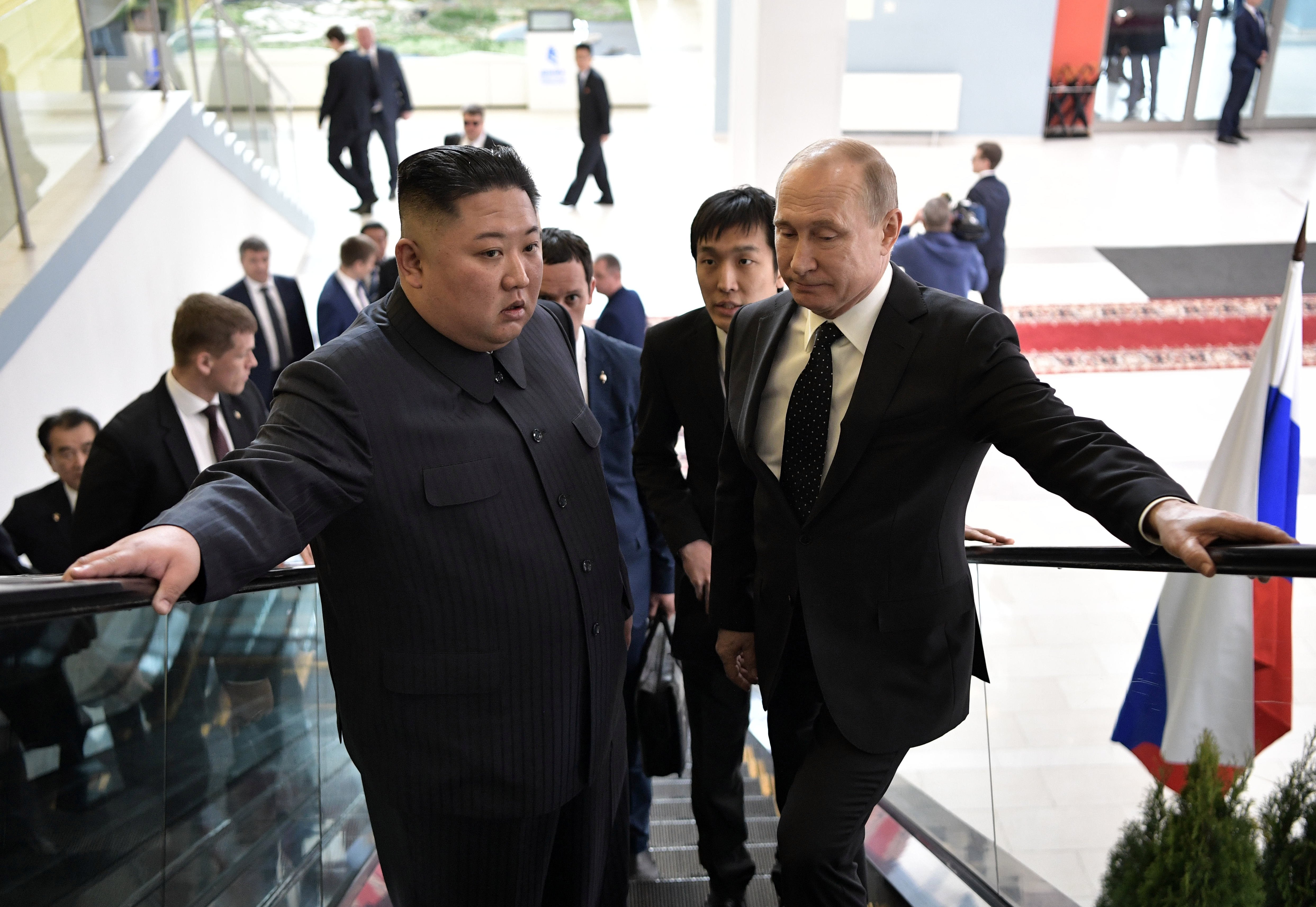 Переговоры Президента Российской Федерации Владимира Путина с Председателем Государственного совета Корейской Народно-Демократической Республики Ким Чен Ыном. Россия, Владивосток, остров Русский.